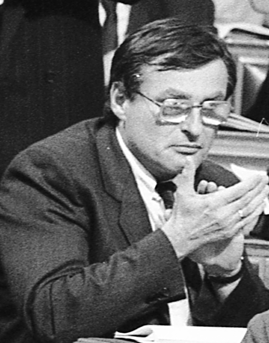 Balsai István magyar ügyvéd, politikus.